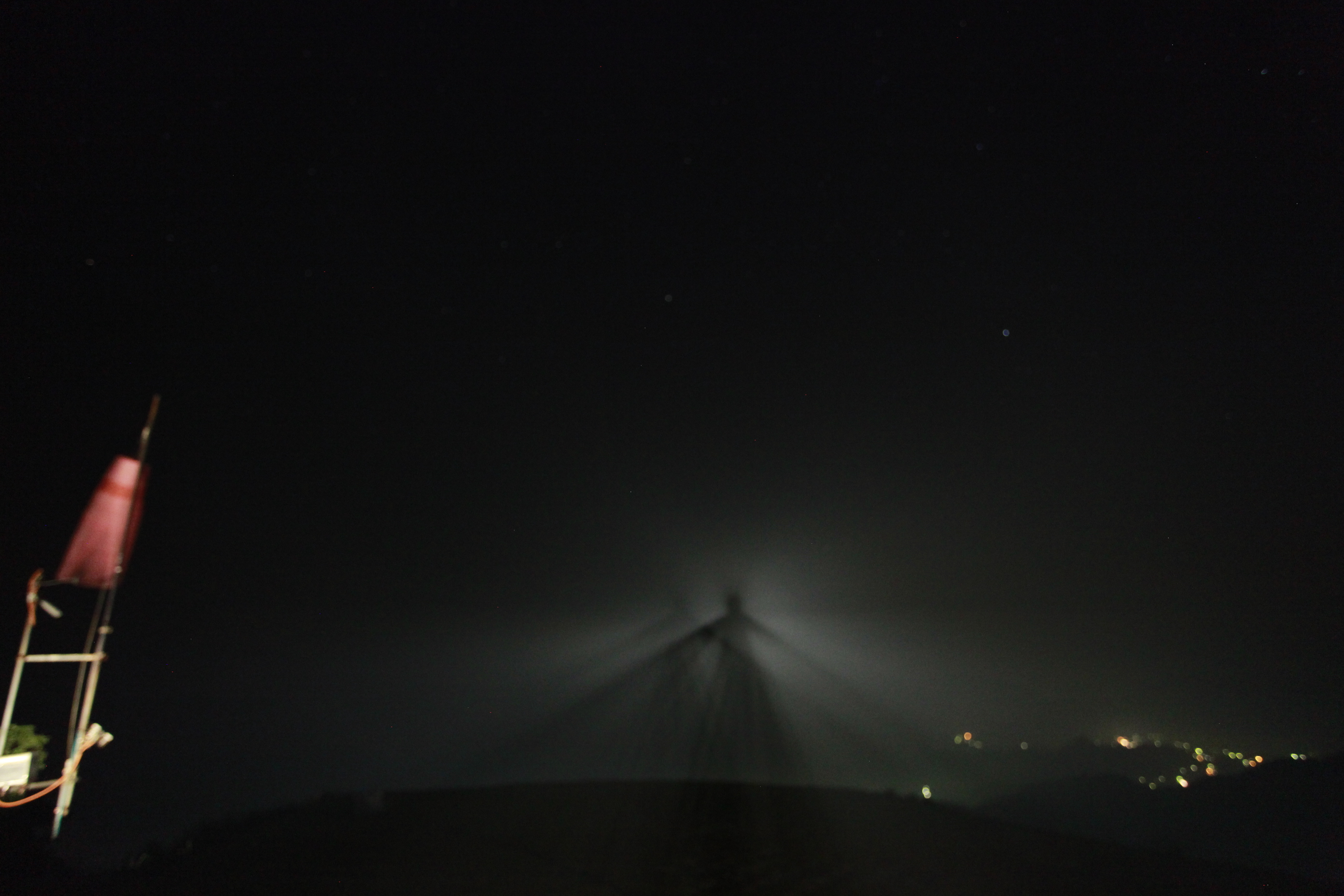 広島県荒谷山フライトエリアで自動車のハイライトによりブロッケン現象